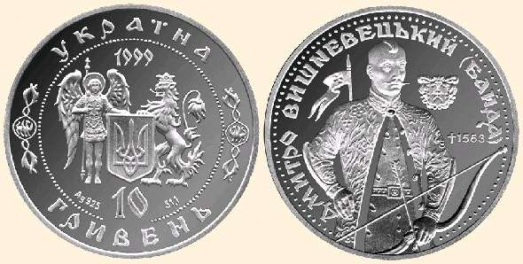 Ювілейна монета, присвячена Дмитру Вишневецькому